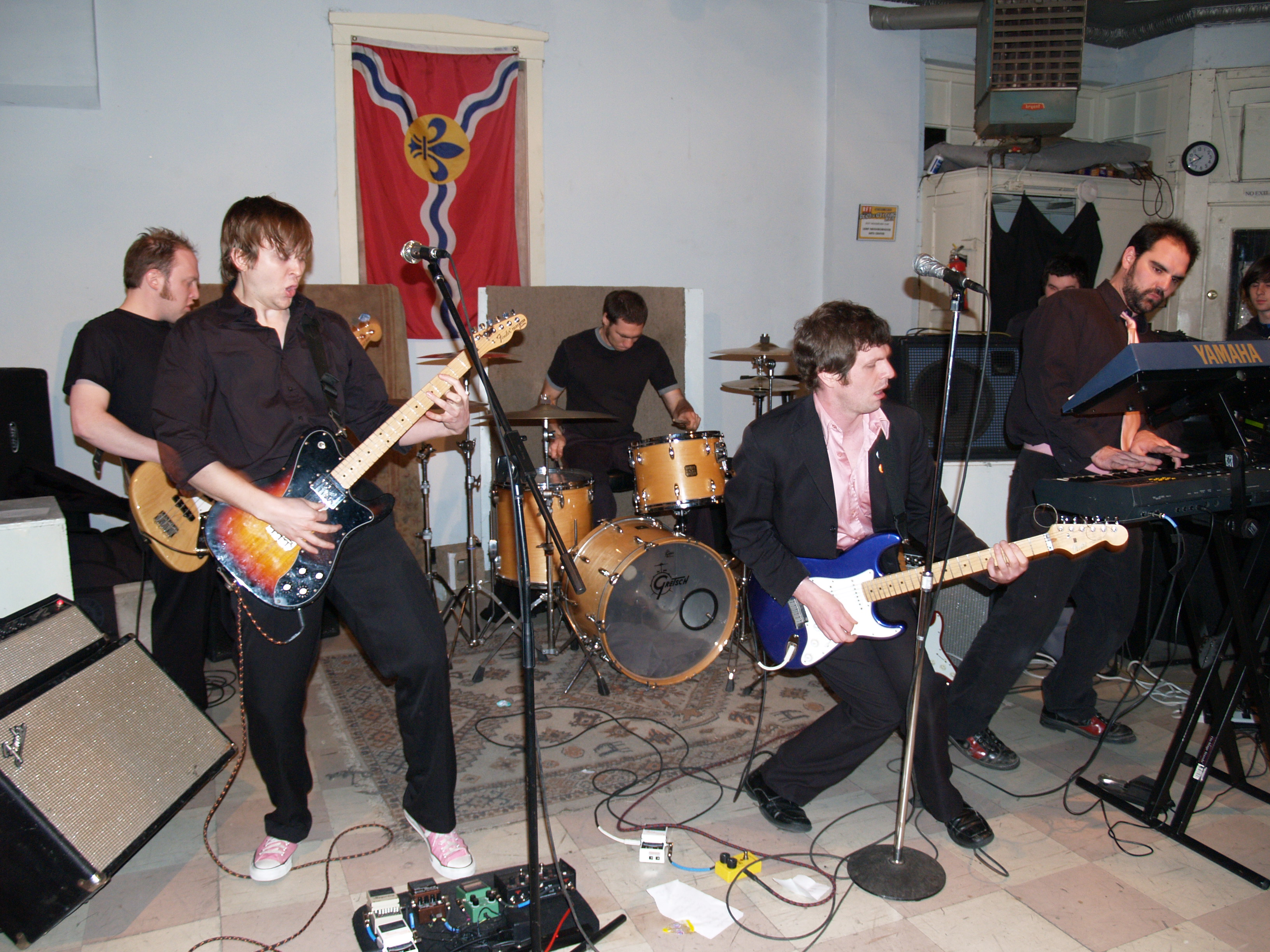 lemp arts center